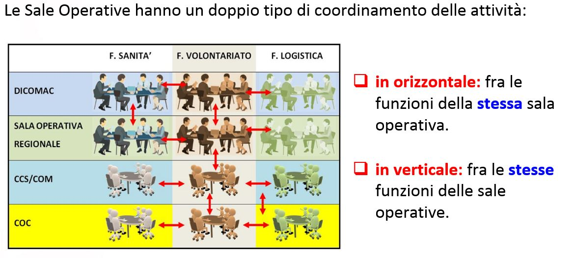 Le Sale Operative hanno un doppio tipo di coordinamento delle attività